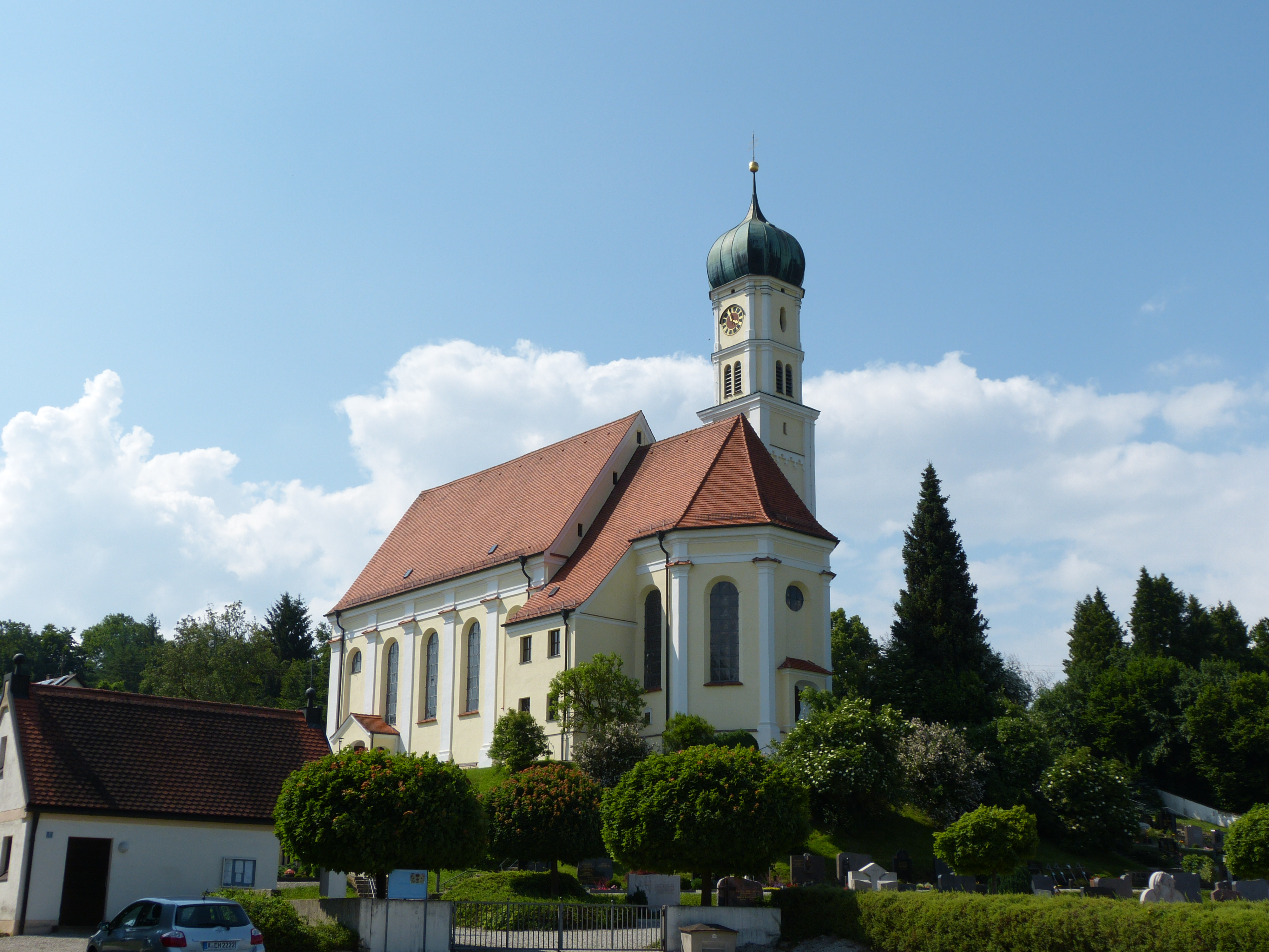 St. Georg, Kirch-Siebnach bei Ettringen, Landkreis Unterallgäu, Bayern, Deutschland